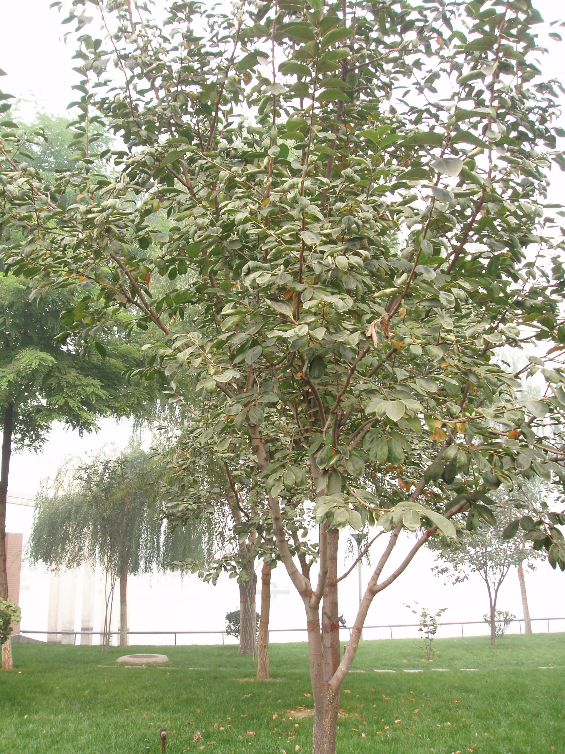 Oriental persimmon tree